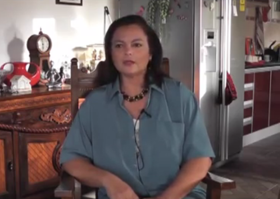 Angelic del Castilho